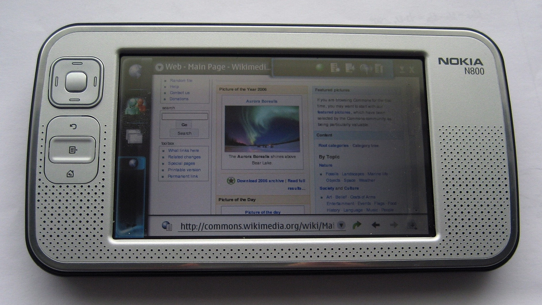 Nokia N800